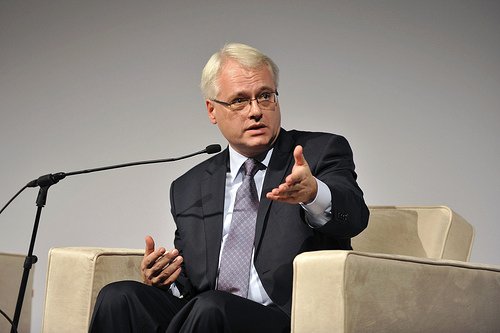 Ivo Josipović sudjelovao je danas na sučeljavanju predsjedničkih kandidata u sklopu ‘Weekend sessiona’ u Zagrebu. Sučeljavanju na temu “Tko je hrvatski Obama” prisustvovali su i Vesna Pusić, Vesna Škare Ožbolt te Andrija Hebrang. Više informacija pročitajte na